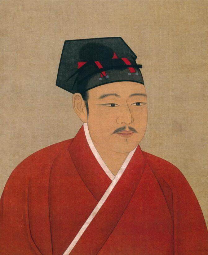 宋徽宗画像